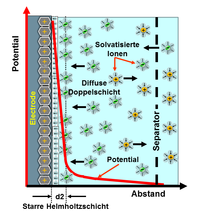 Potentialverlauf in einer Helmhotz-Trennschicht sowie weiterer Verlauf in der diffusen Doppelschicht